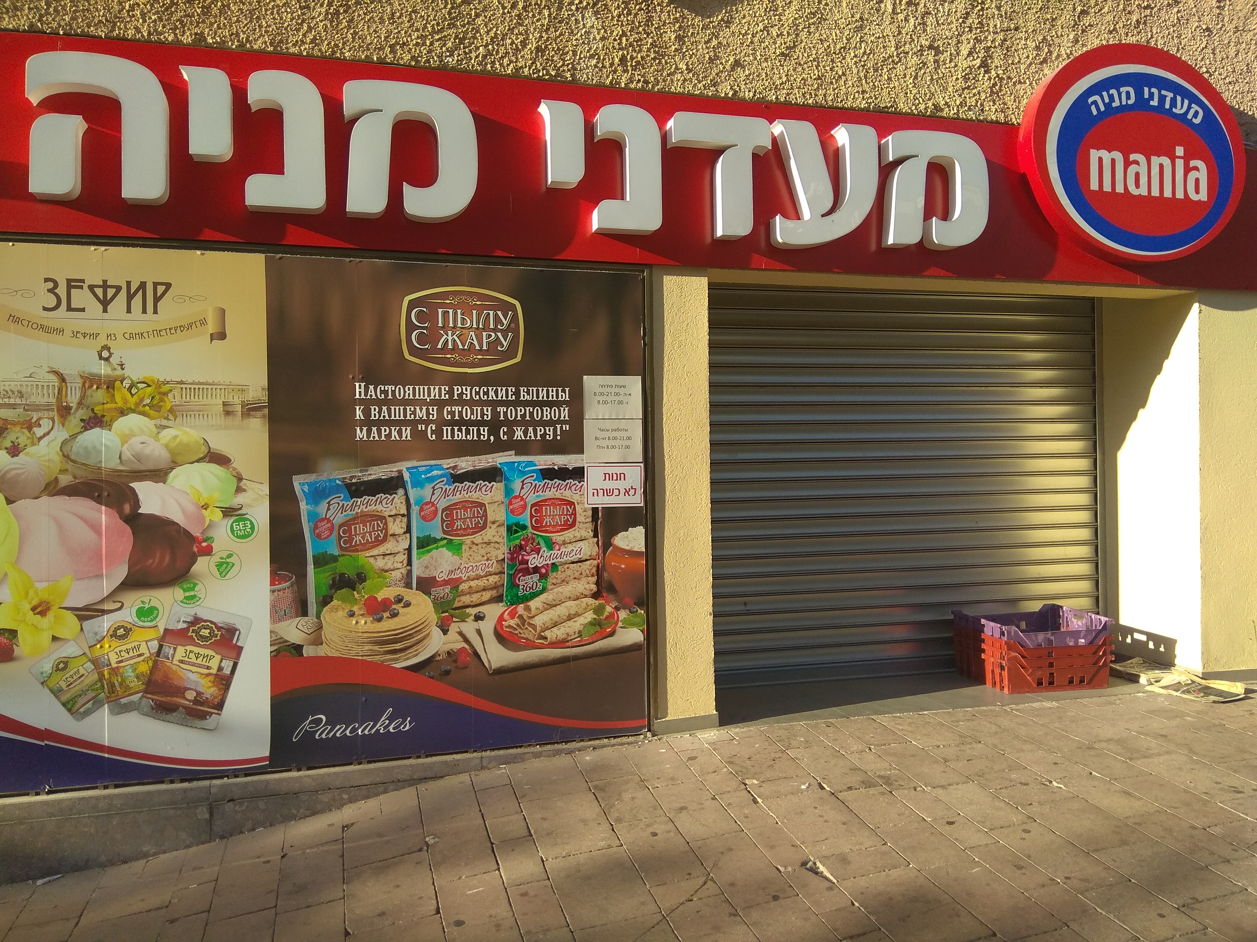 סניף מעדני מניה בחדרה